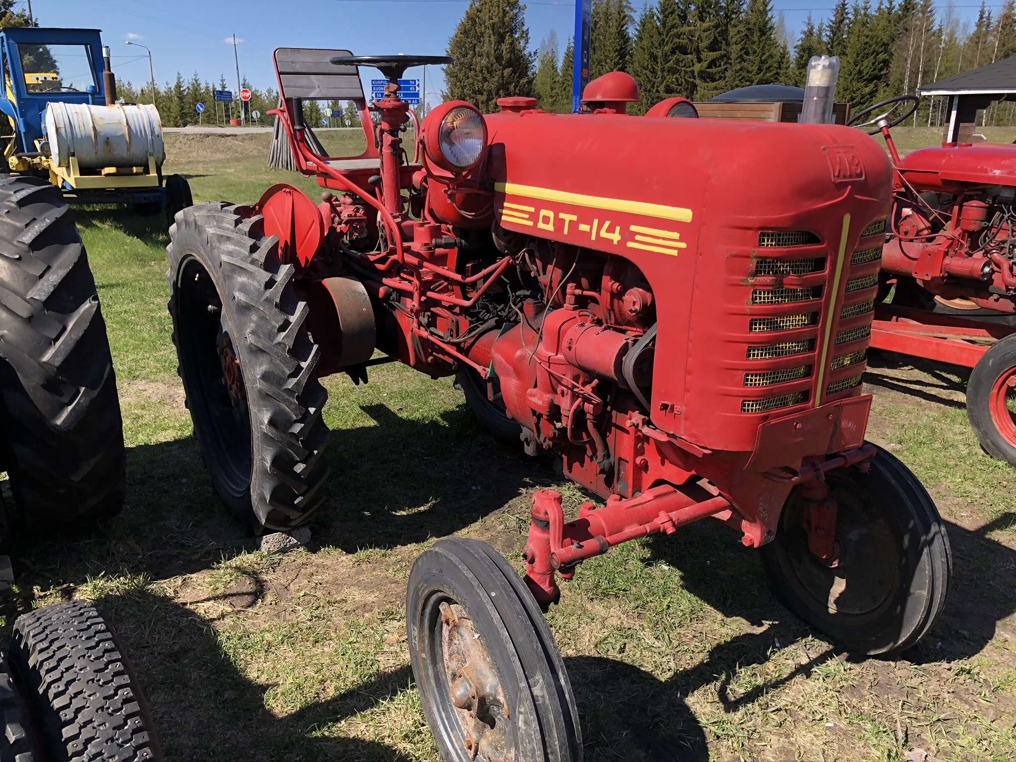 DT-14 traktori Liikenneasema Jari-Pekan pihassa Hankasalmella.